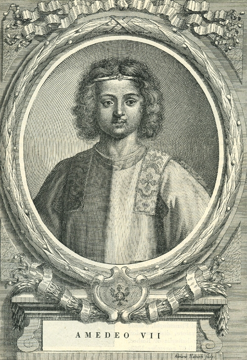 Amedeo VII di Savoia (1360 - 1391)